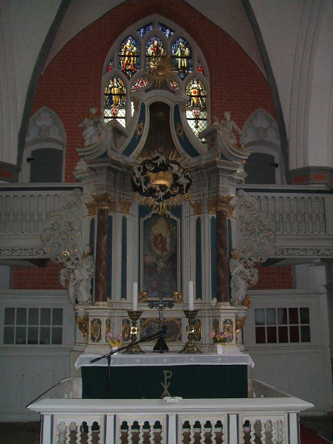 Altar in der Stralsunder Heilgesitkirche